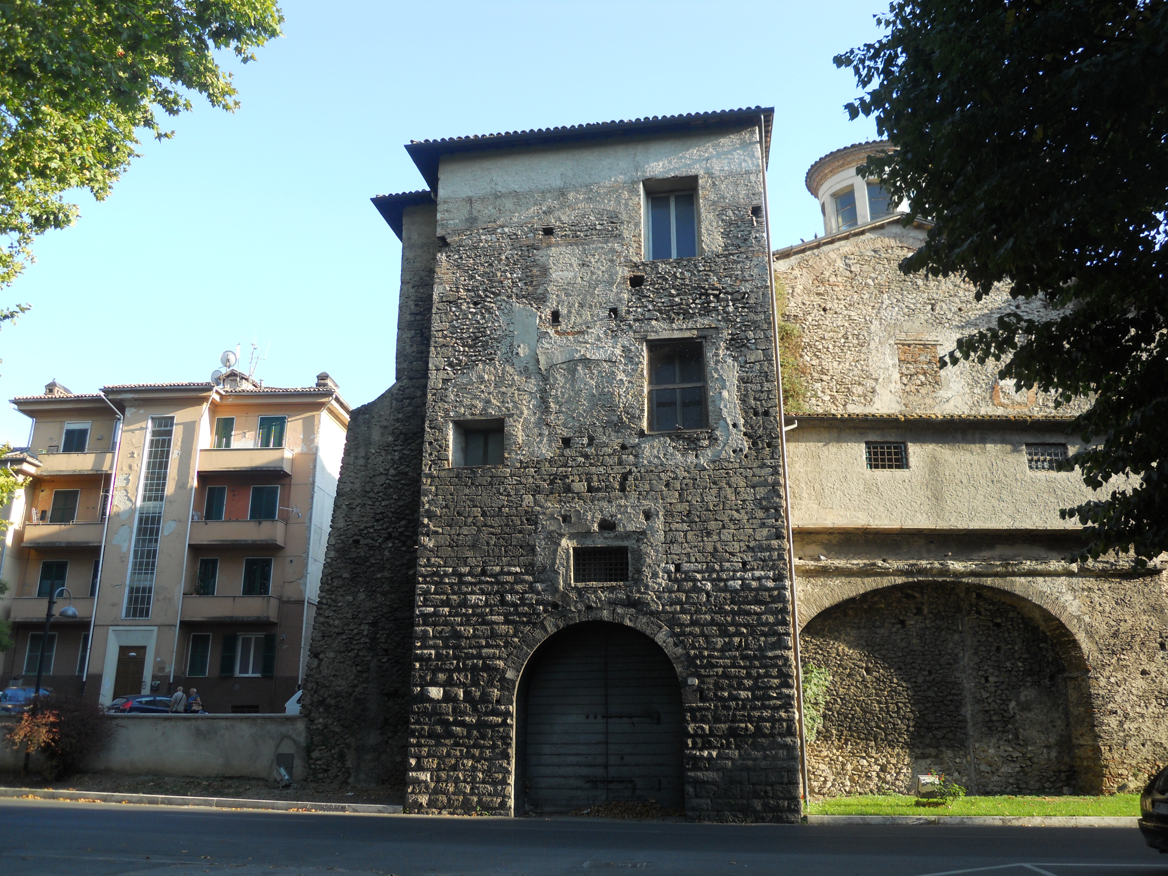 Mura di Rieti - interruzione di porta d'Arci